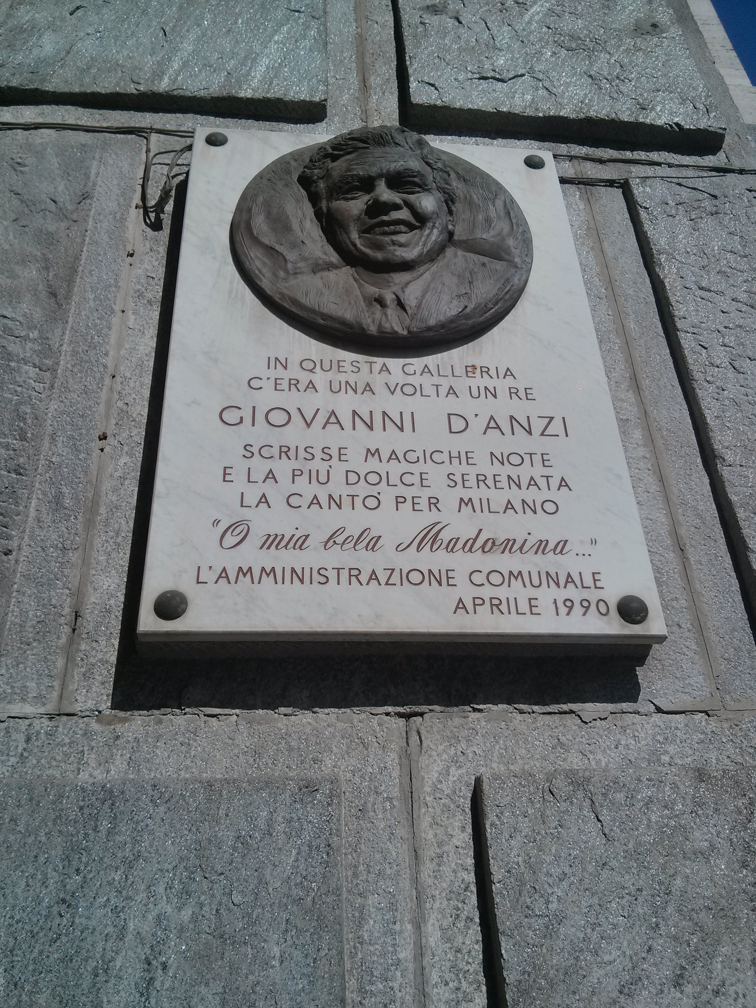 epigrafe Giovanni D'Anzi - commemorativa - o mia bela madonina